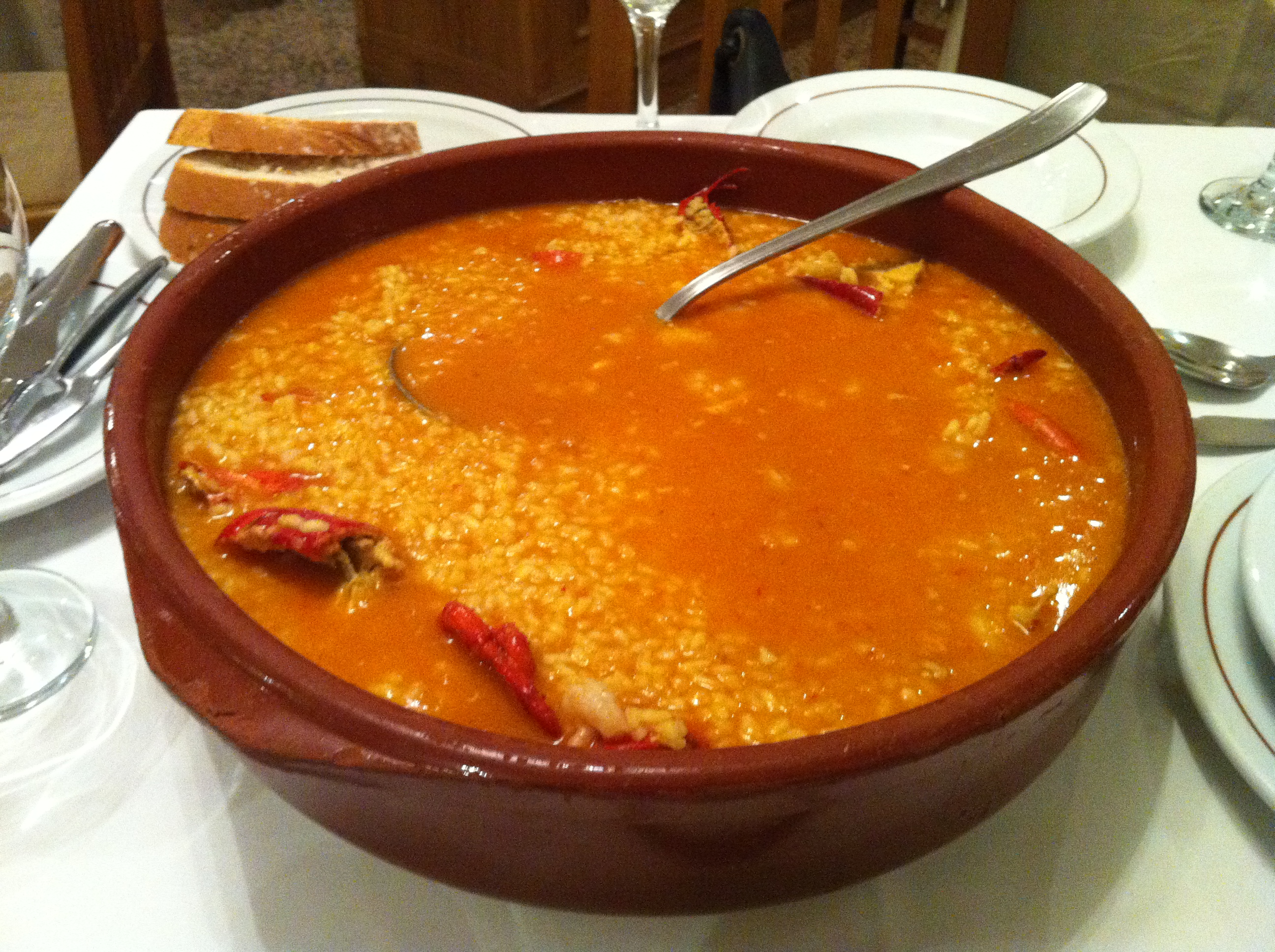 Arroz con bogavante - Caldoso (servido en cazuela de barro)